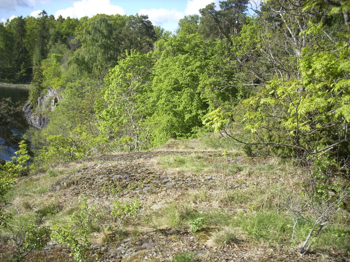 I lysåpen skog på Mellomøya vokser lodnefiolen.